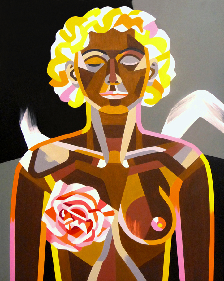 Rissa, Rosenengel, 1992, Öl auf Leinen, 100 x 80 cm